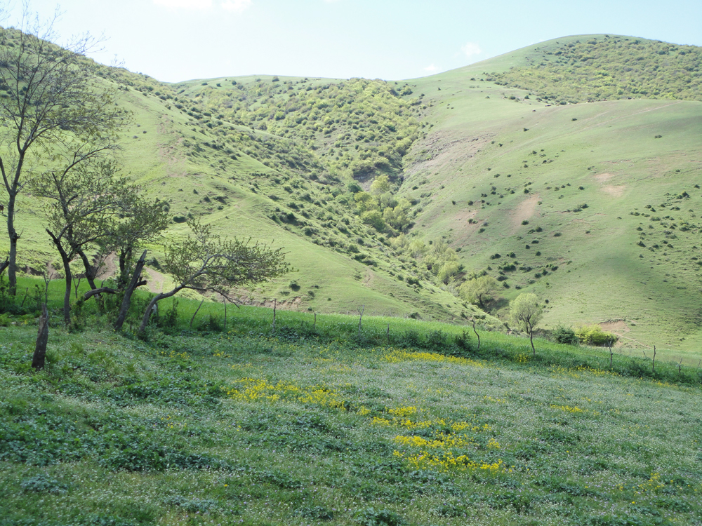 Germi rayonu - Cəngan Kəndinin Doğası